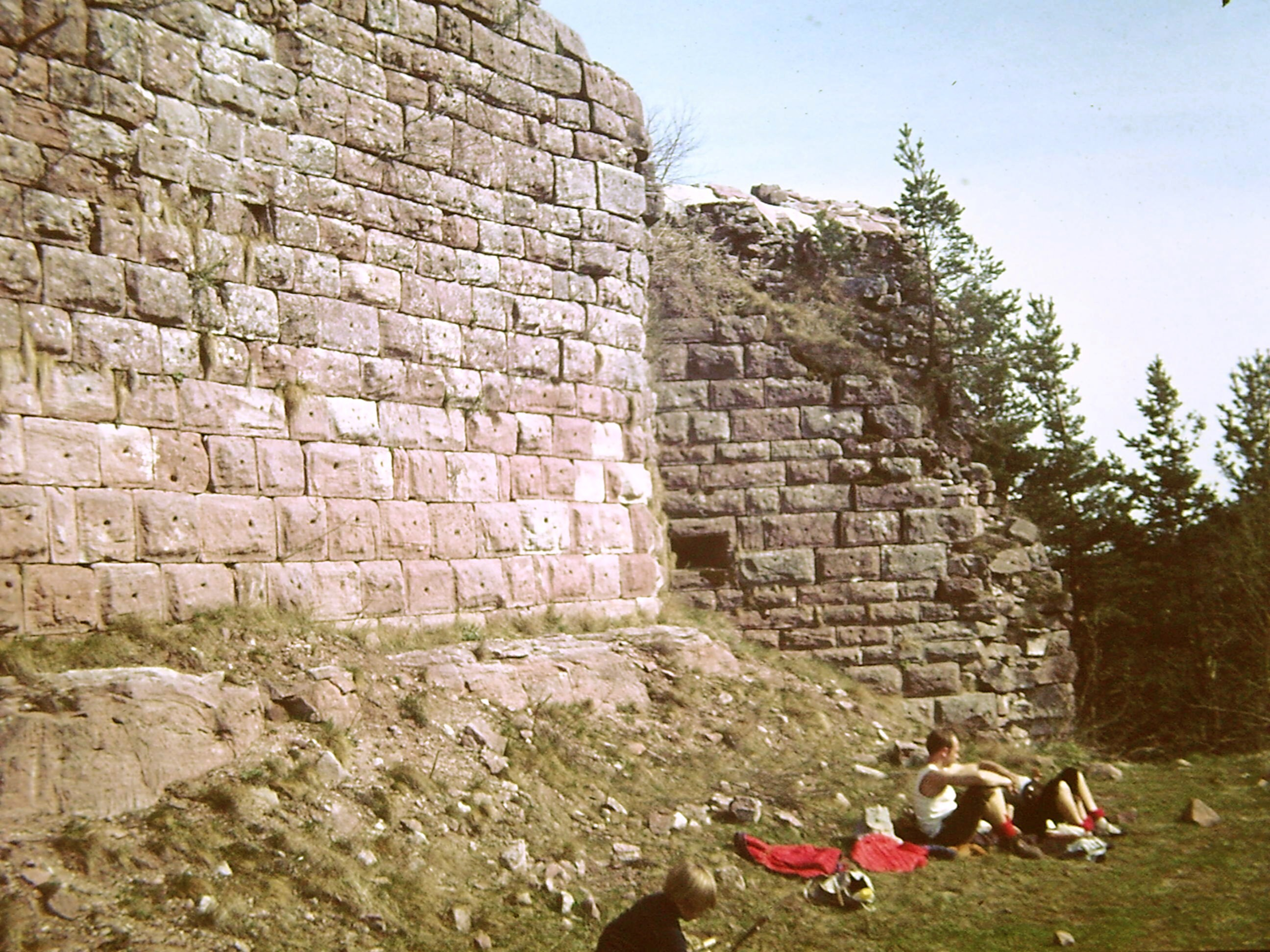 Château du Hohnack - les courtines